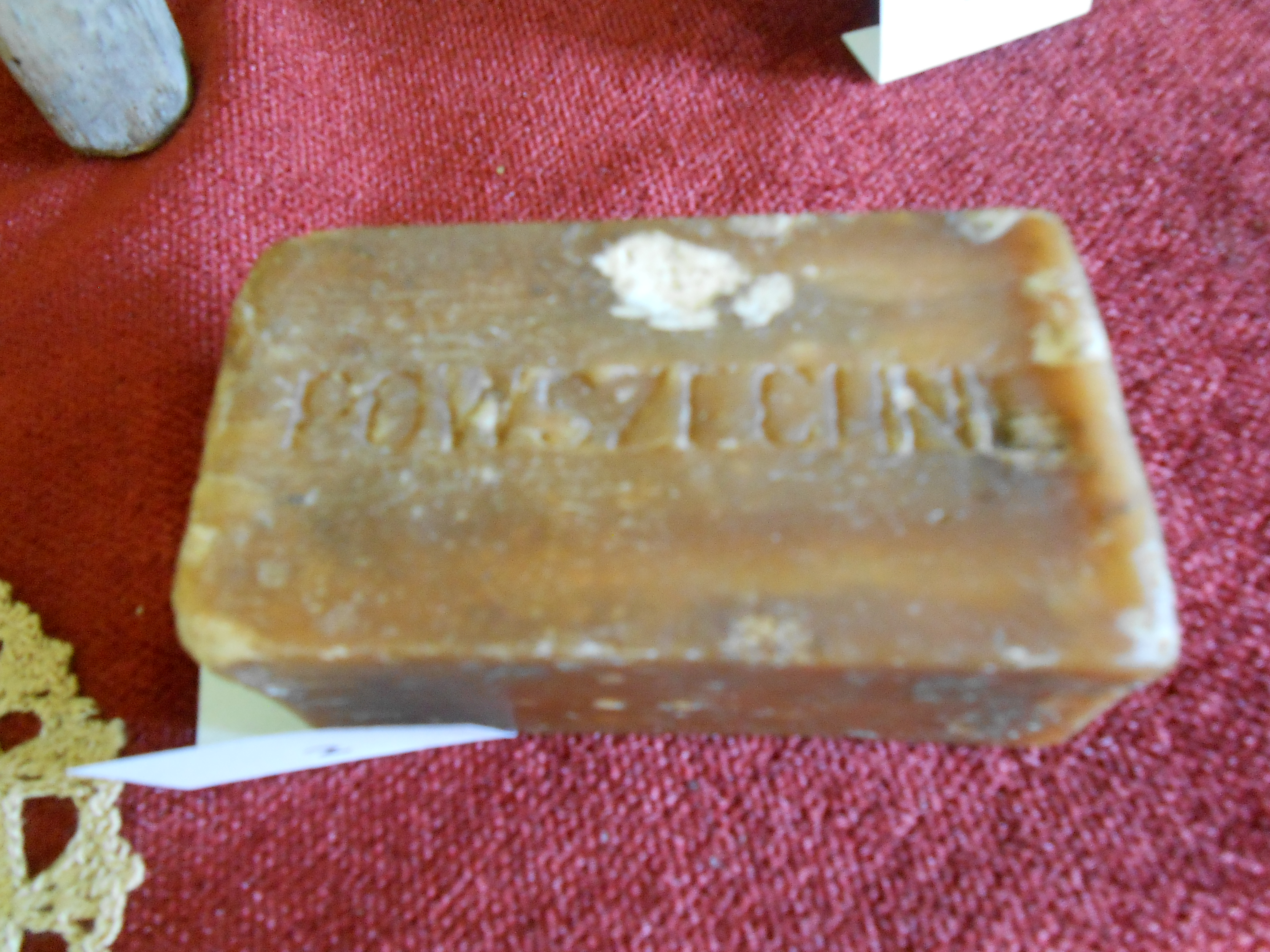 Eksponat wypożyczony od Stowarzyszenia "Nasze Psary"